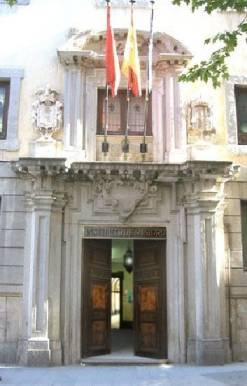 Fotografía de la puerta del Instituto San Isidro de Madrid.